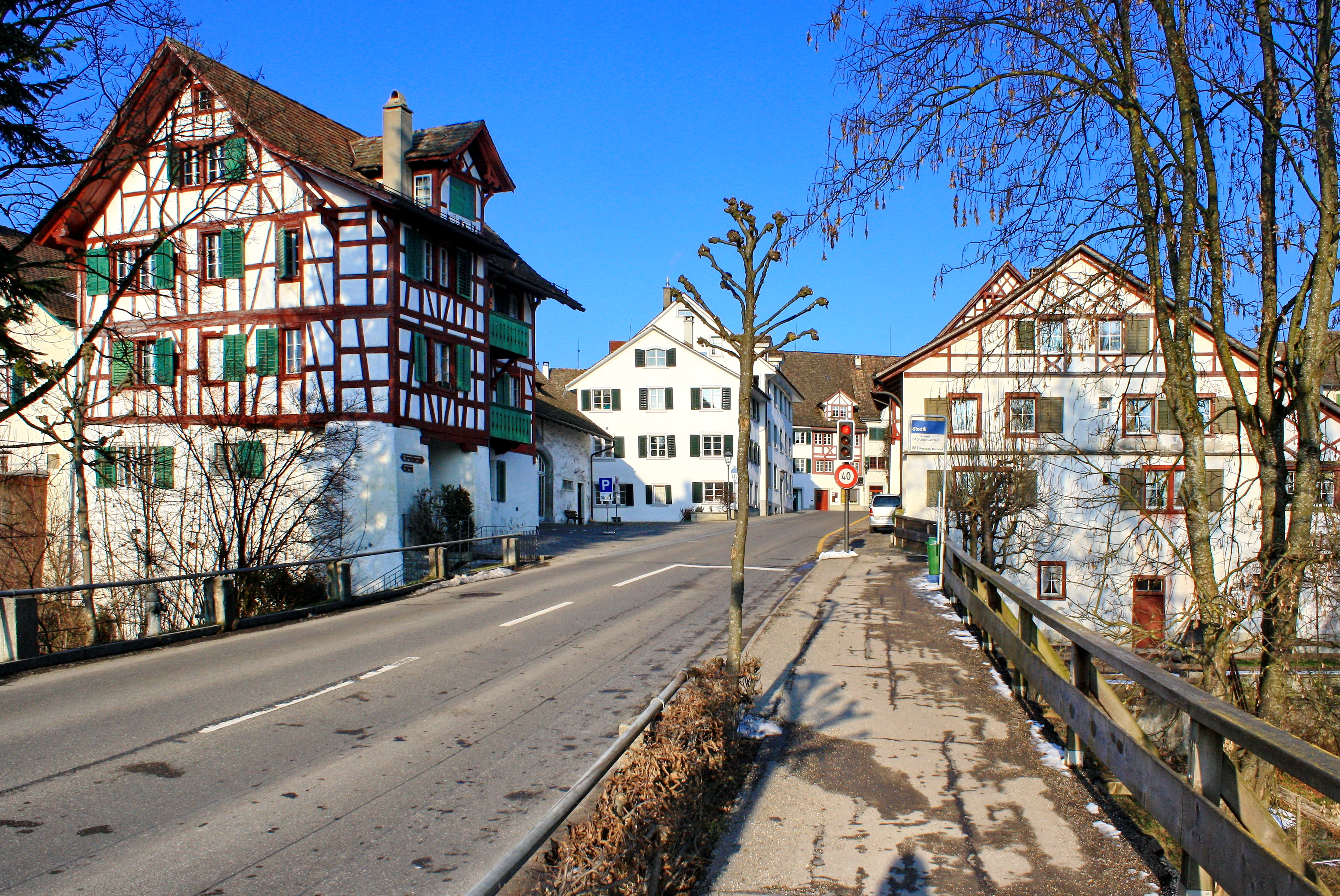 Stedtli Grüningen (Switzerland)